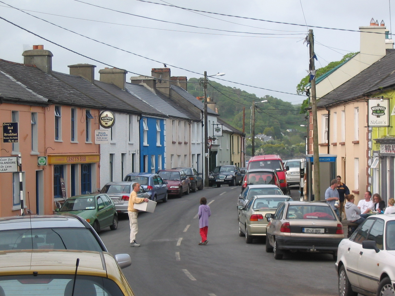 Der Ort Unionhall